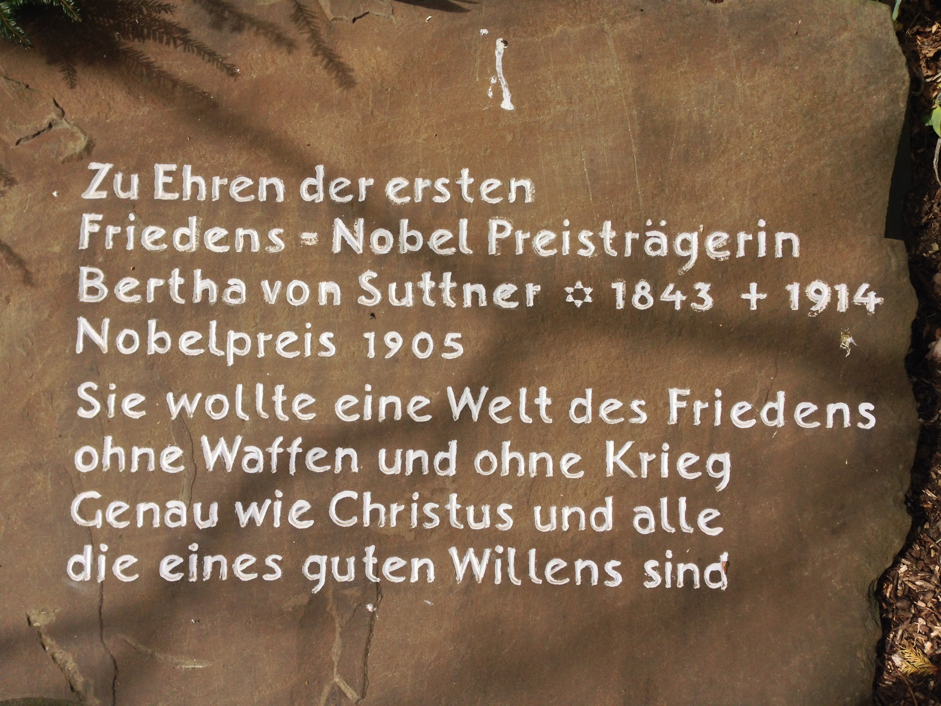 Gebotstafel